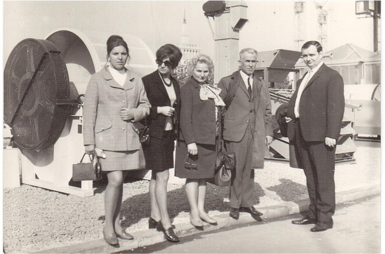 Budapešť expozice podniků ČSSR 1972